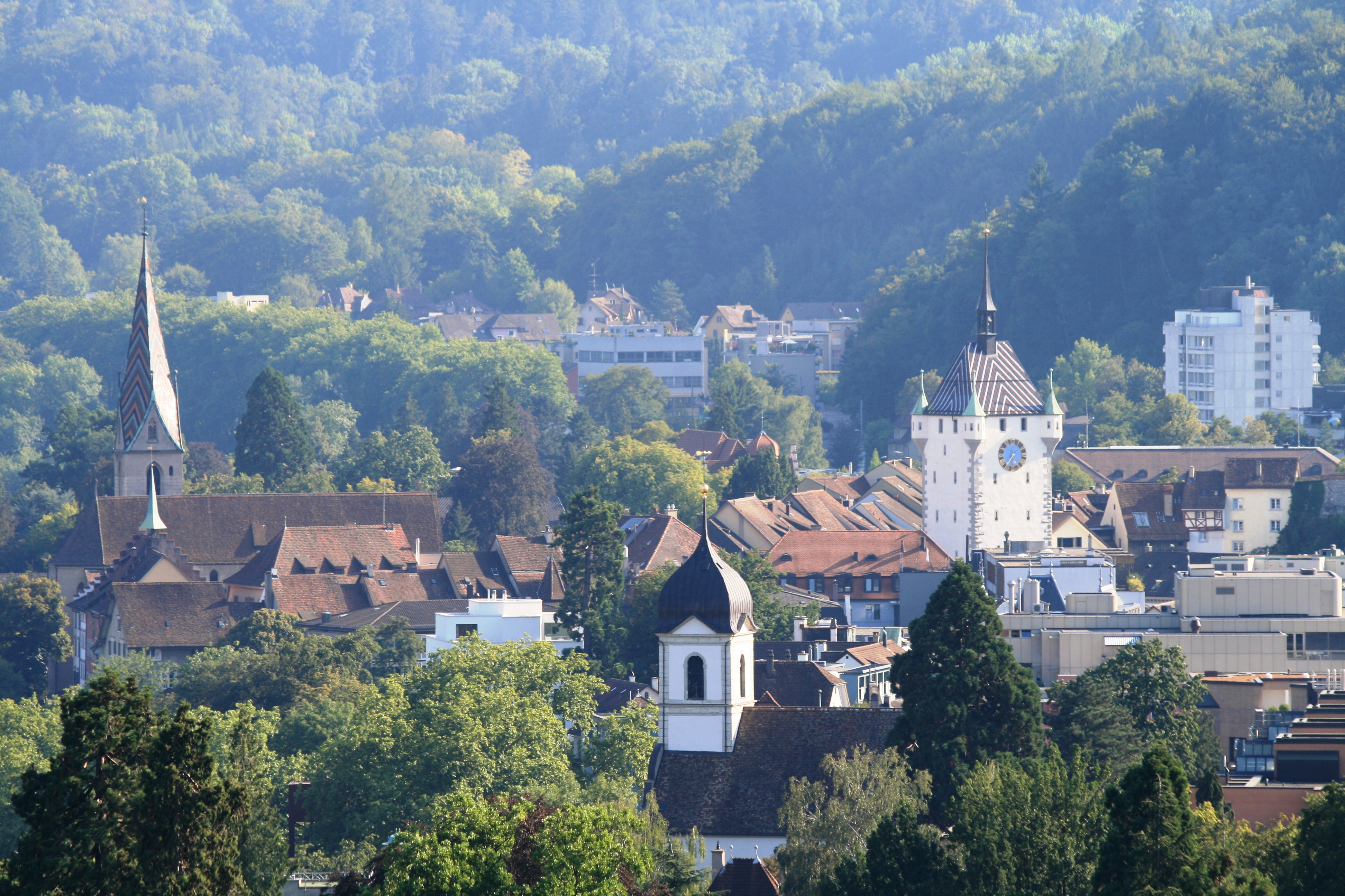 Altstadt von Baden AG, Schweiz Links die katholische Pfarrkirche, rechts der Stadtturm und im Vordergrund die reformierte Kirche